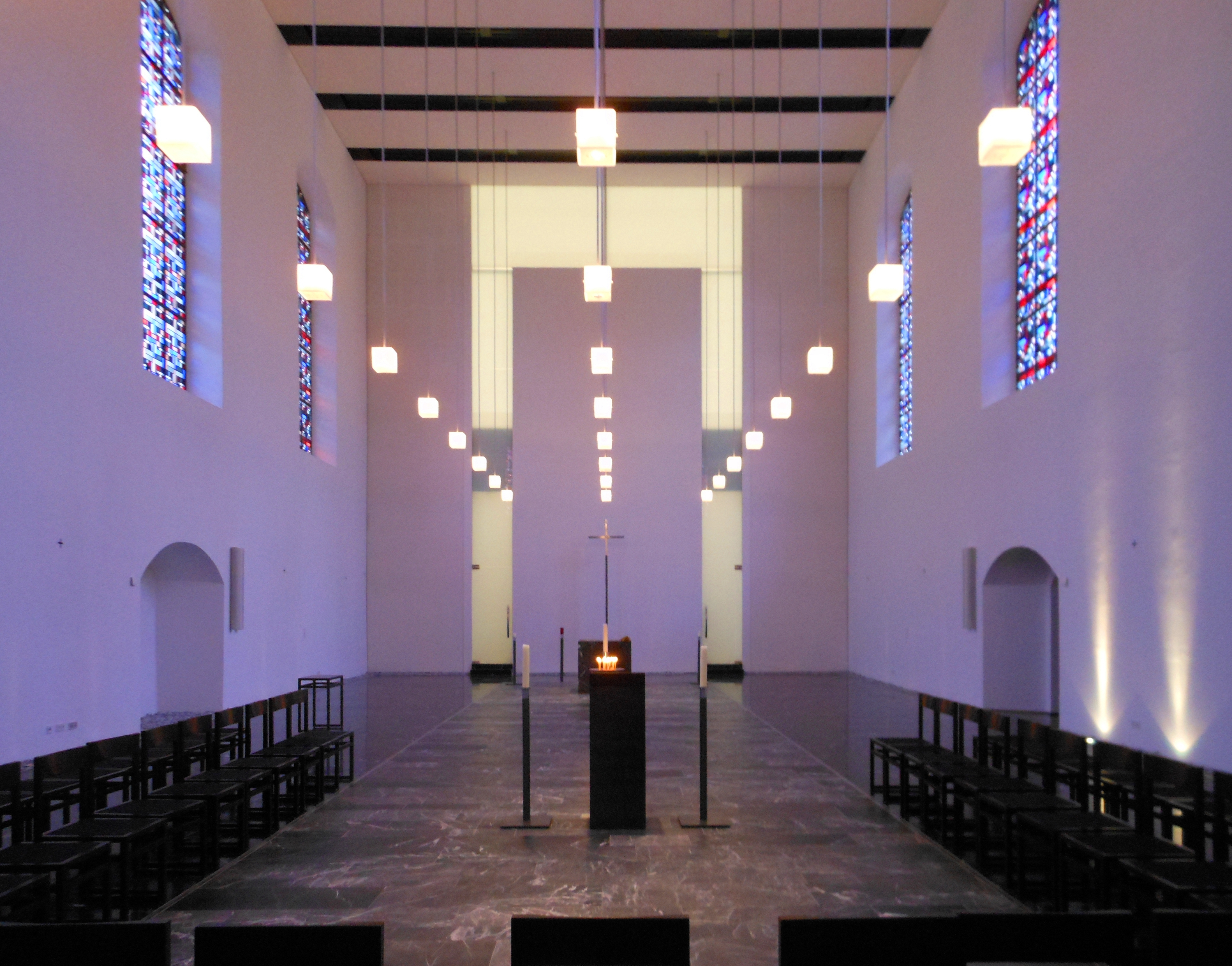 Hildesheim, Seminarkirche, Innenraum 2013